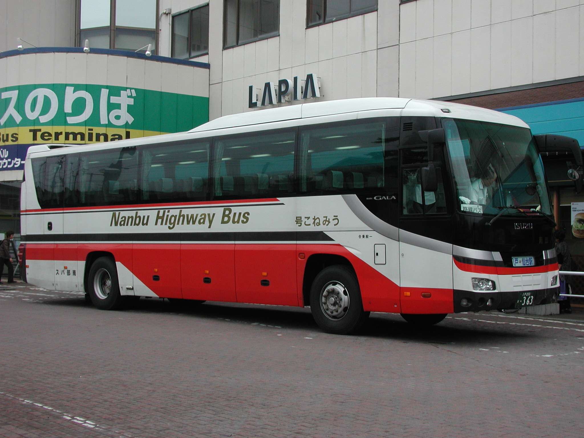 南部バス高速路線塗装（いすゞ・ガーラ ・PKG-RU1ESAJ）：うみねこ号専用車両八戸ラピアバスターミナルにて